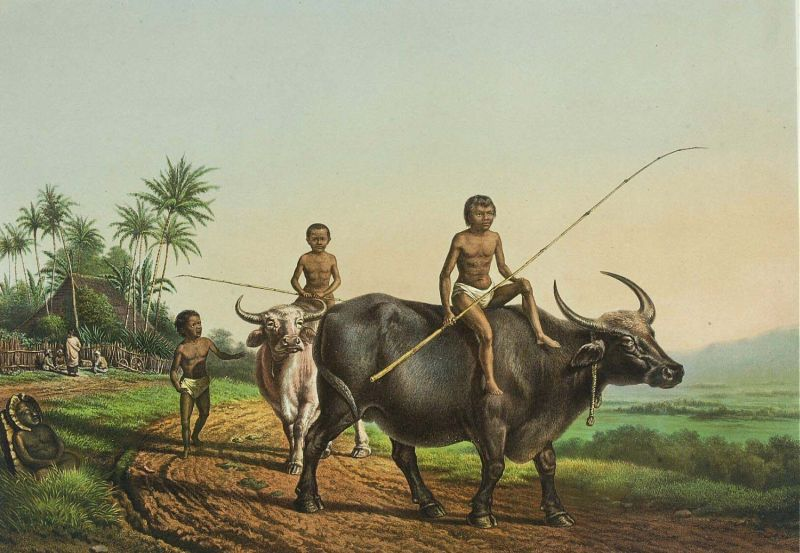 Litho naar een werk van Frans Lebret. Pagina 22 van de map "De Indische Archipel", Den Haag, 1865-1876 met daarin 24 kleurenlitho's, van objectnr. 3728-430 t/m 3728-479